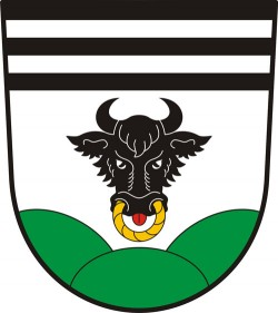 Prosetín